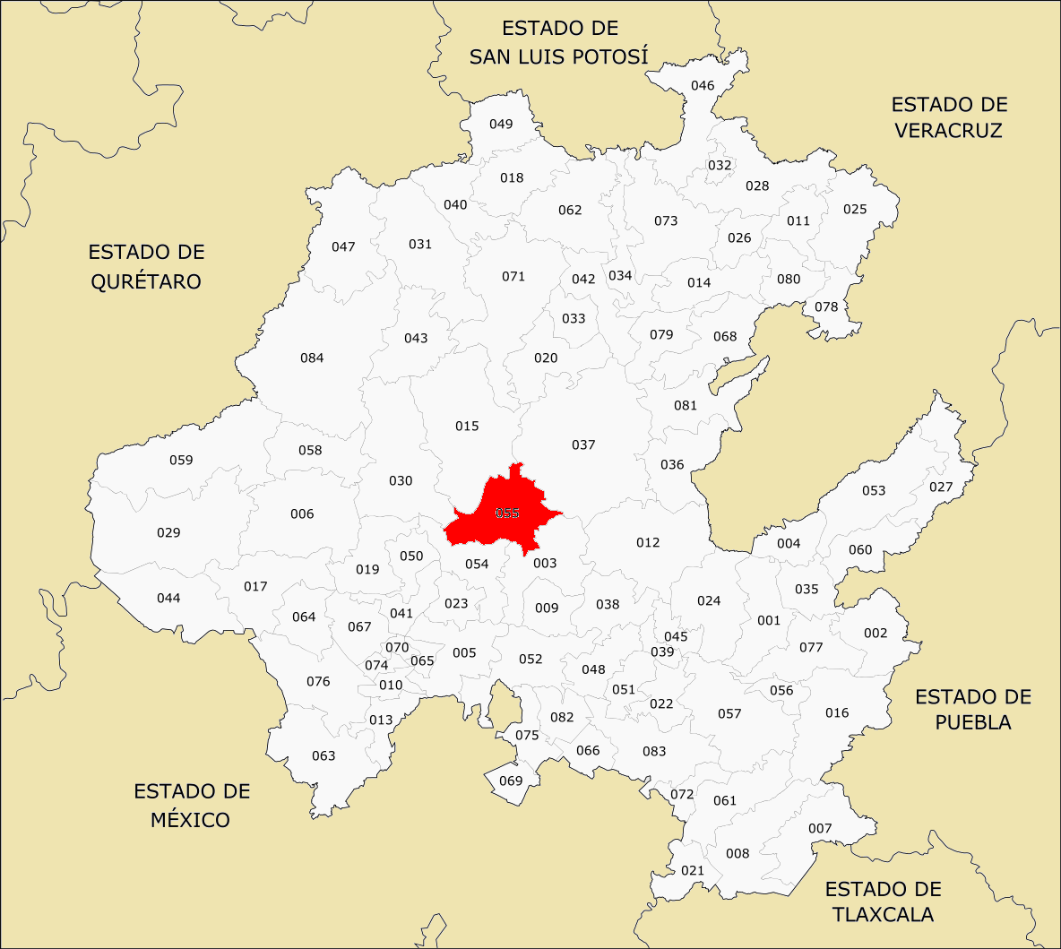 Municipio de Hidalgo